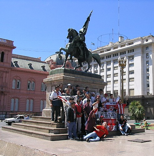 Photo d'un groupe de supporters de River Plate, devant la Casa Rosada, à Buenos-Aires, Argentine. Victoire de RP, 2-0.